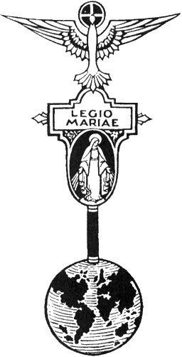 Vexillum Legionis ou Estandarte Legionário, pertence à Legião de Maria, associação de leigos católicos fundada em Dublin, Irlanda, por Frank Duff.